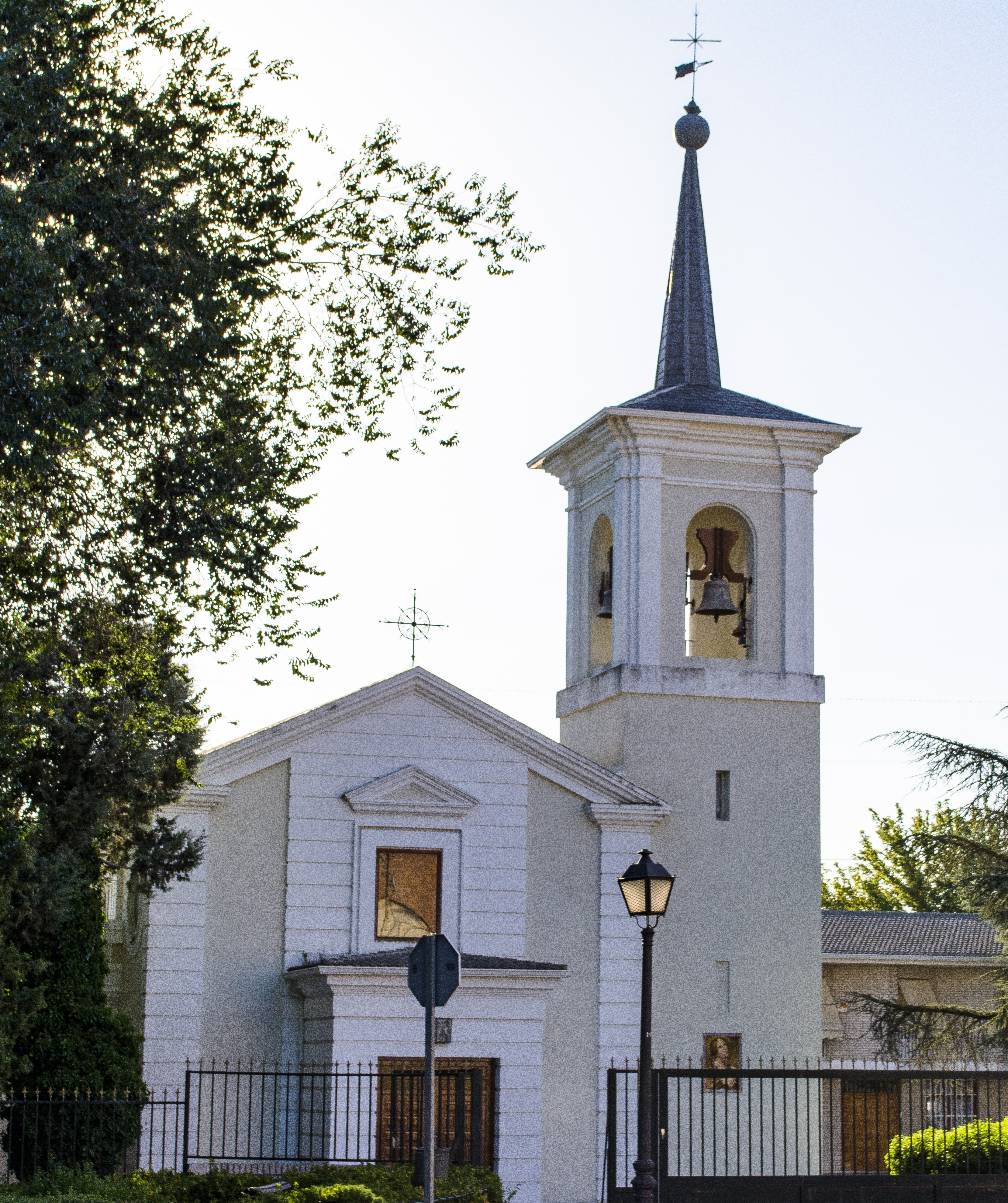 Ermita de San Gregorio, situada en el barrio de Húmera (Pozuelo de Alarcón).